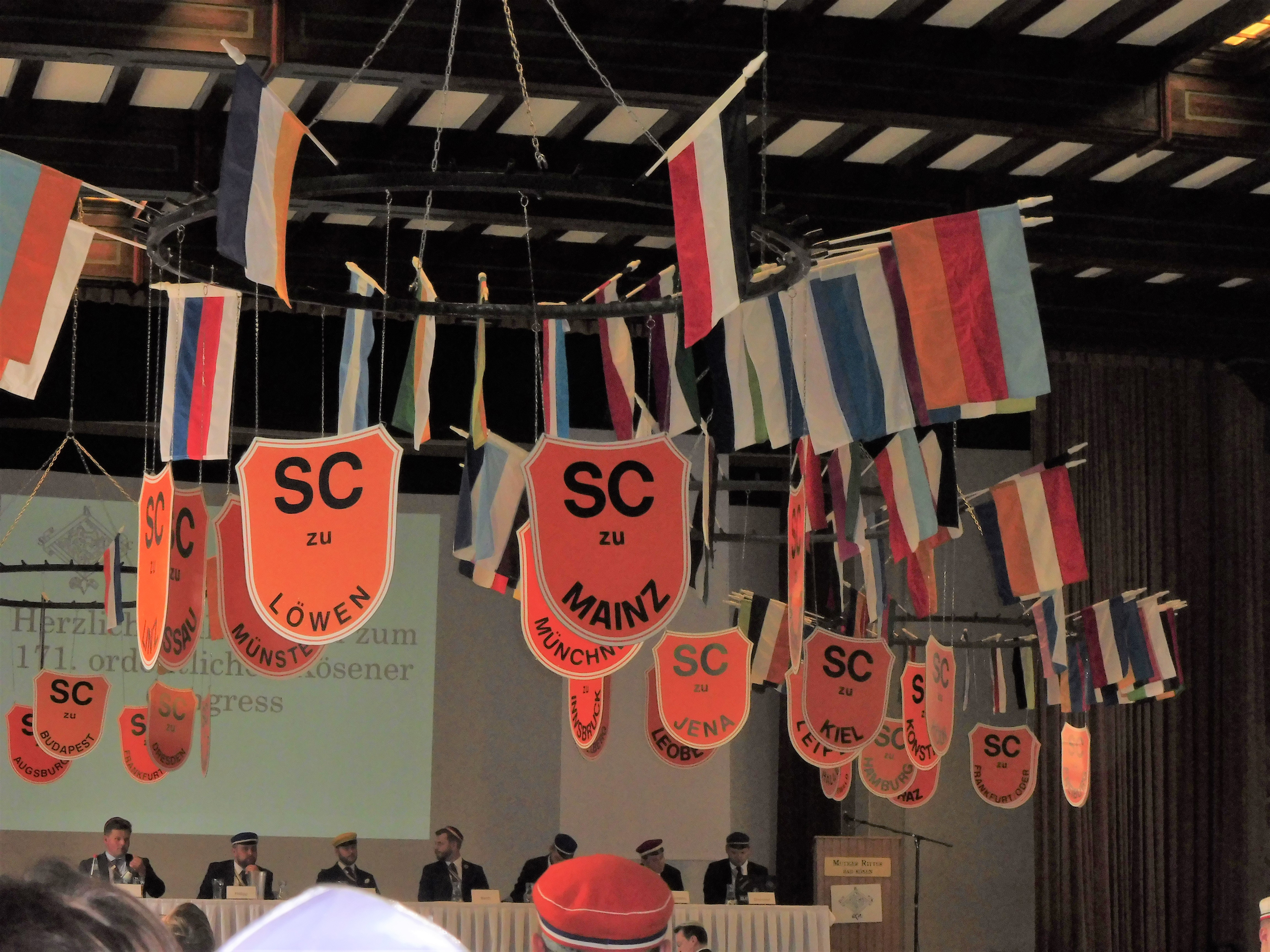 Schilde der Senioren-Convente beim Kösener Congress im Mutigen Ritter, Bad Kösen